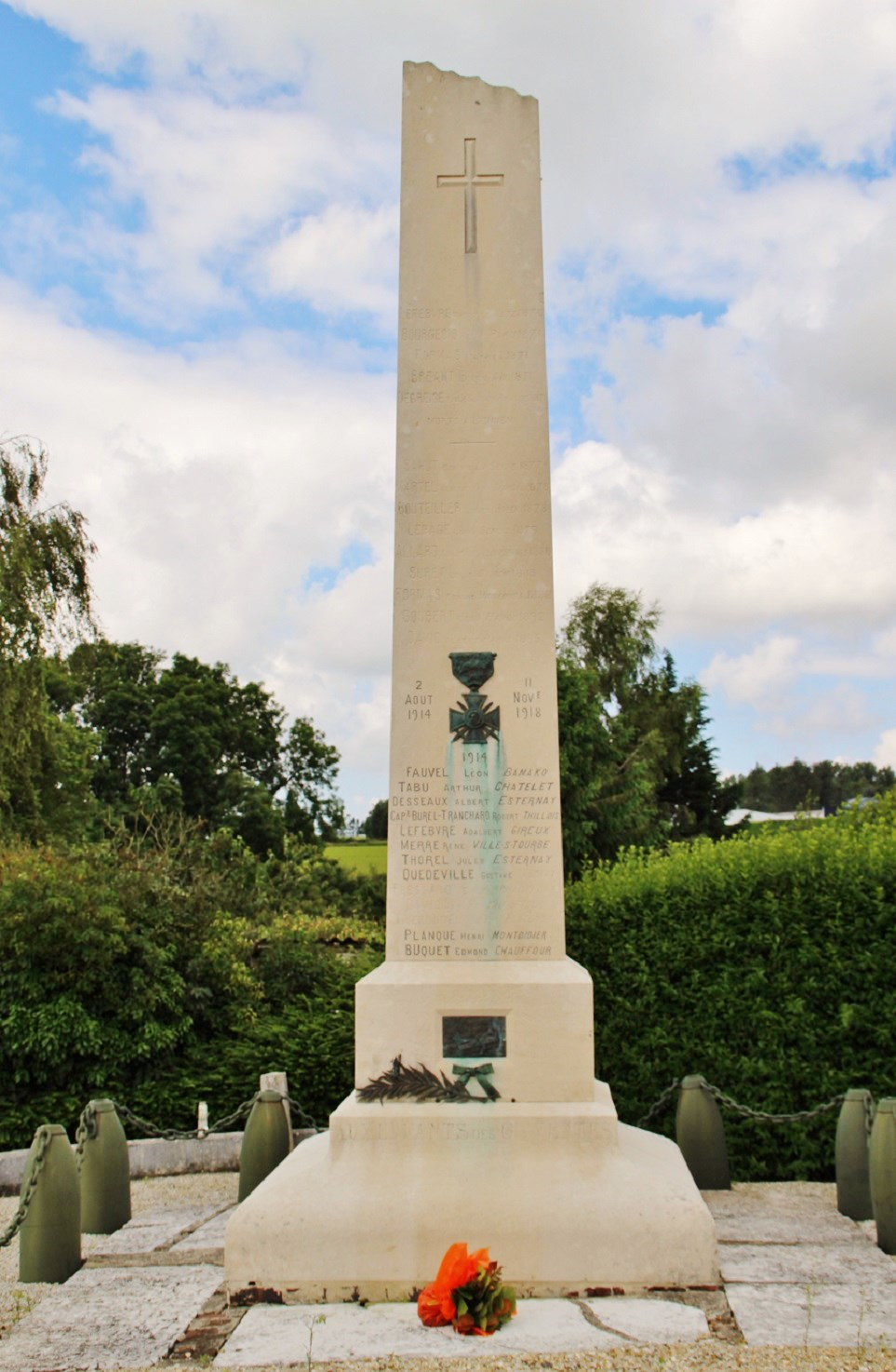 Le Monument-aux-Morts